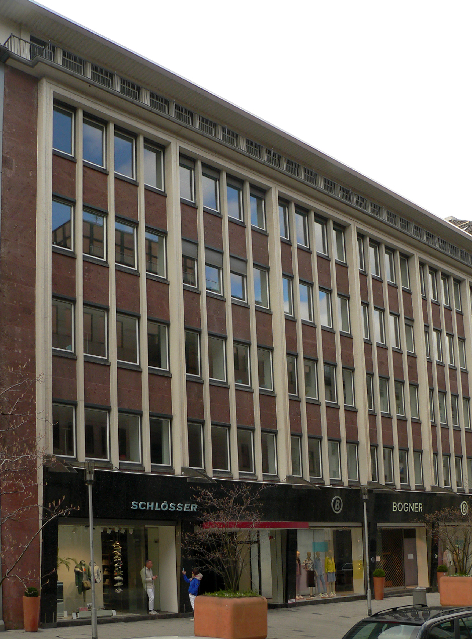 Sitz des Friedrich Verlag in der Luisenstraße in Hannover